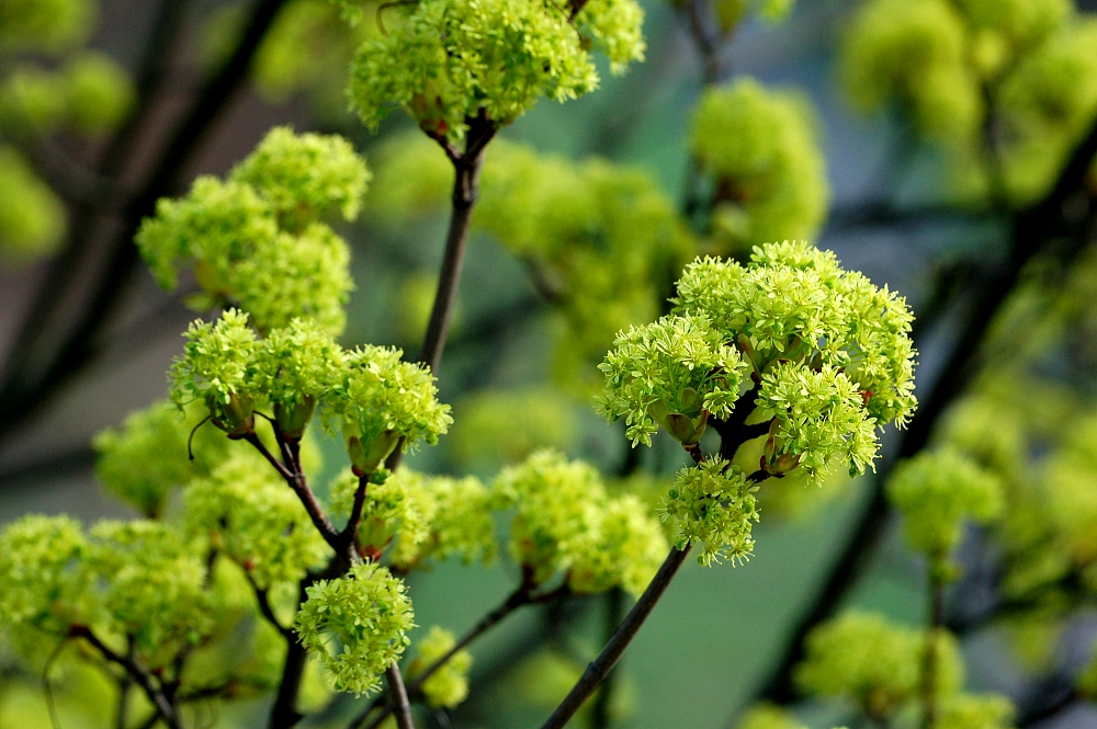 Acer platanoides, flowers, Schwanheim Dune, Frankfurt am Main, Germany